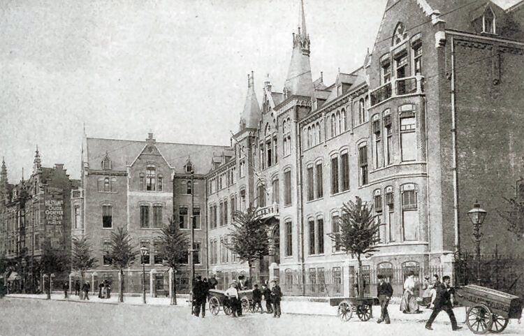 Het Sint Antoniusgesticht in 1910. Fotograaf onbekend